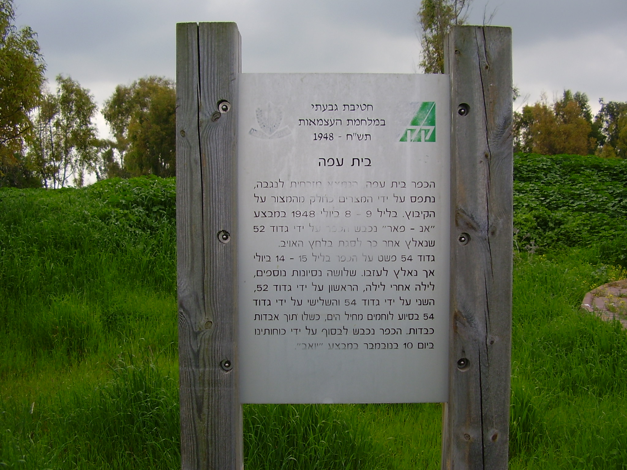 שלט הסבר באתר ההנצחה לנופלים בקרבות בית עפה במלחמת העצמאות